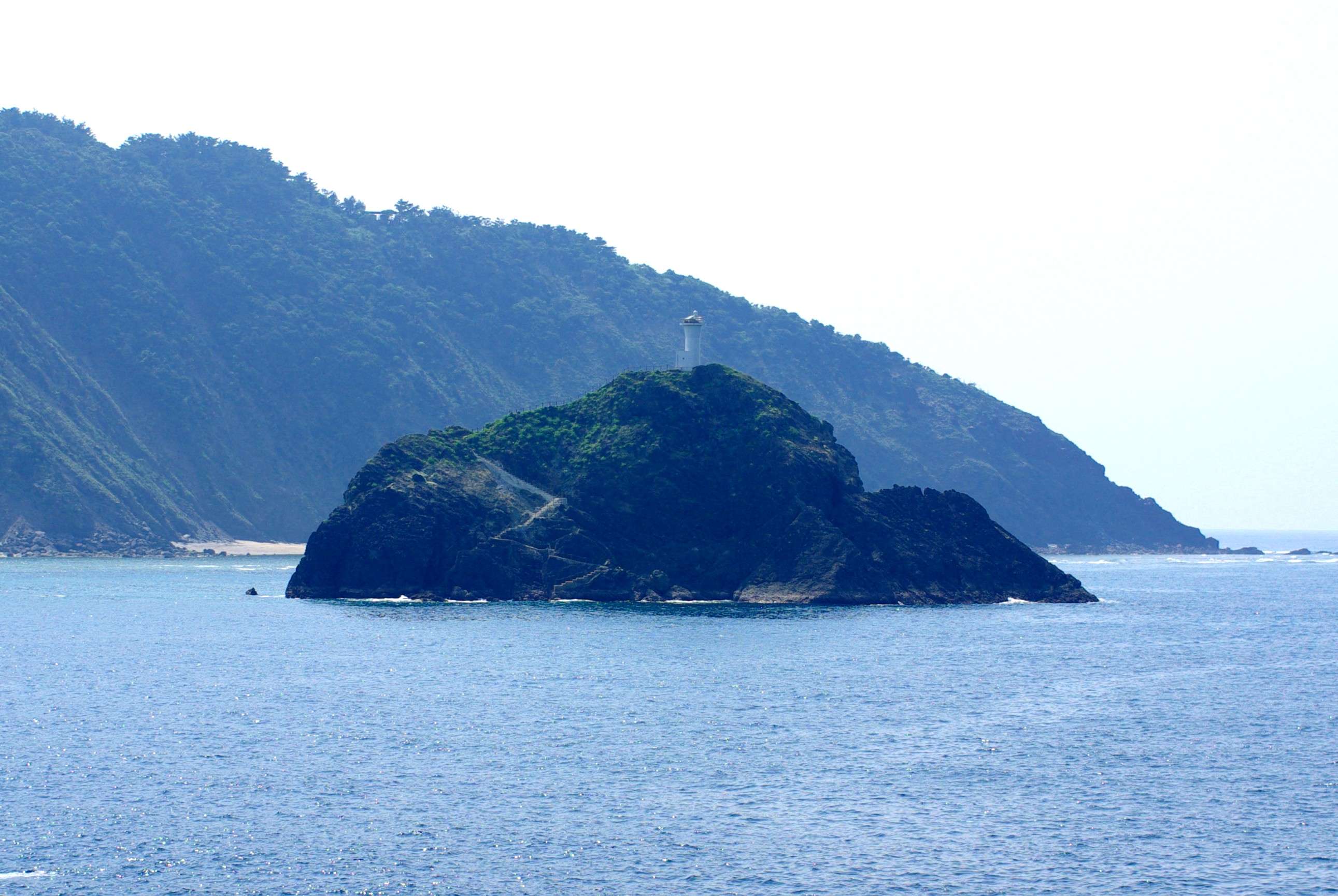 鹿児島県奄美大島名瀬港の立神灯台